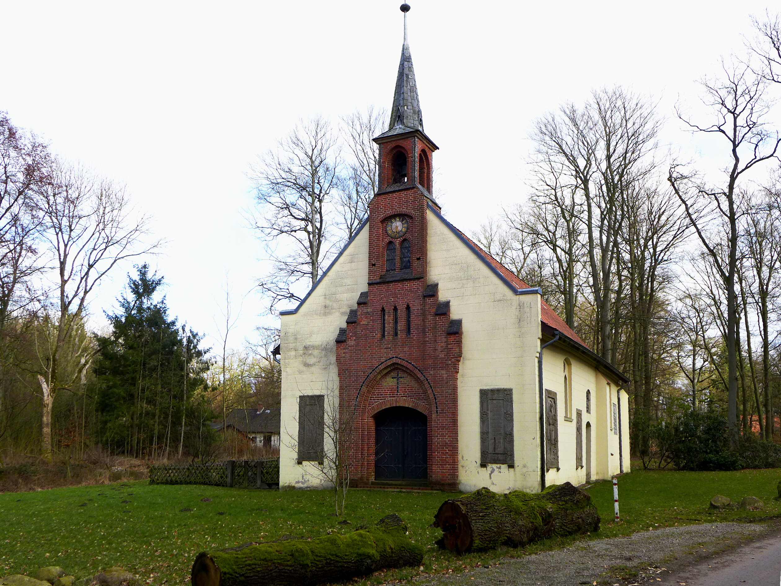 Kapelle derer von der Wense in Wense (Osterheide), Niedersachsen. Überwiegend wird diese Kapelle vom Adelsgeschlecht derer von der Wense genutzt, gelegentlich werden hier auch Kirchenkonzerte für die Öffentlichkeit veranstaltet.